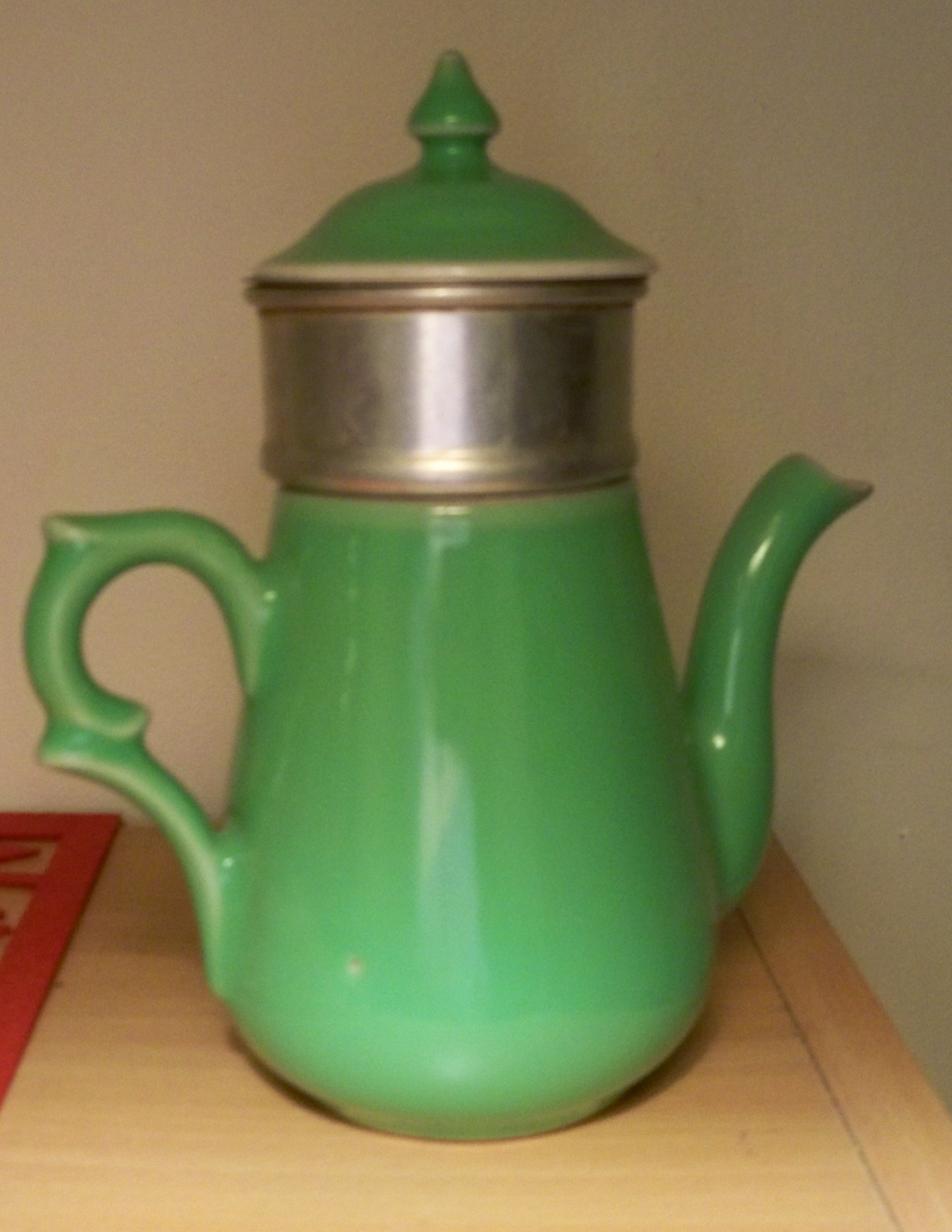 Cafetière